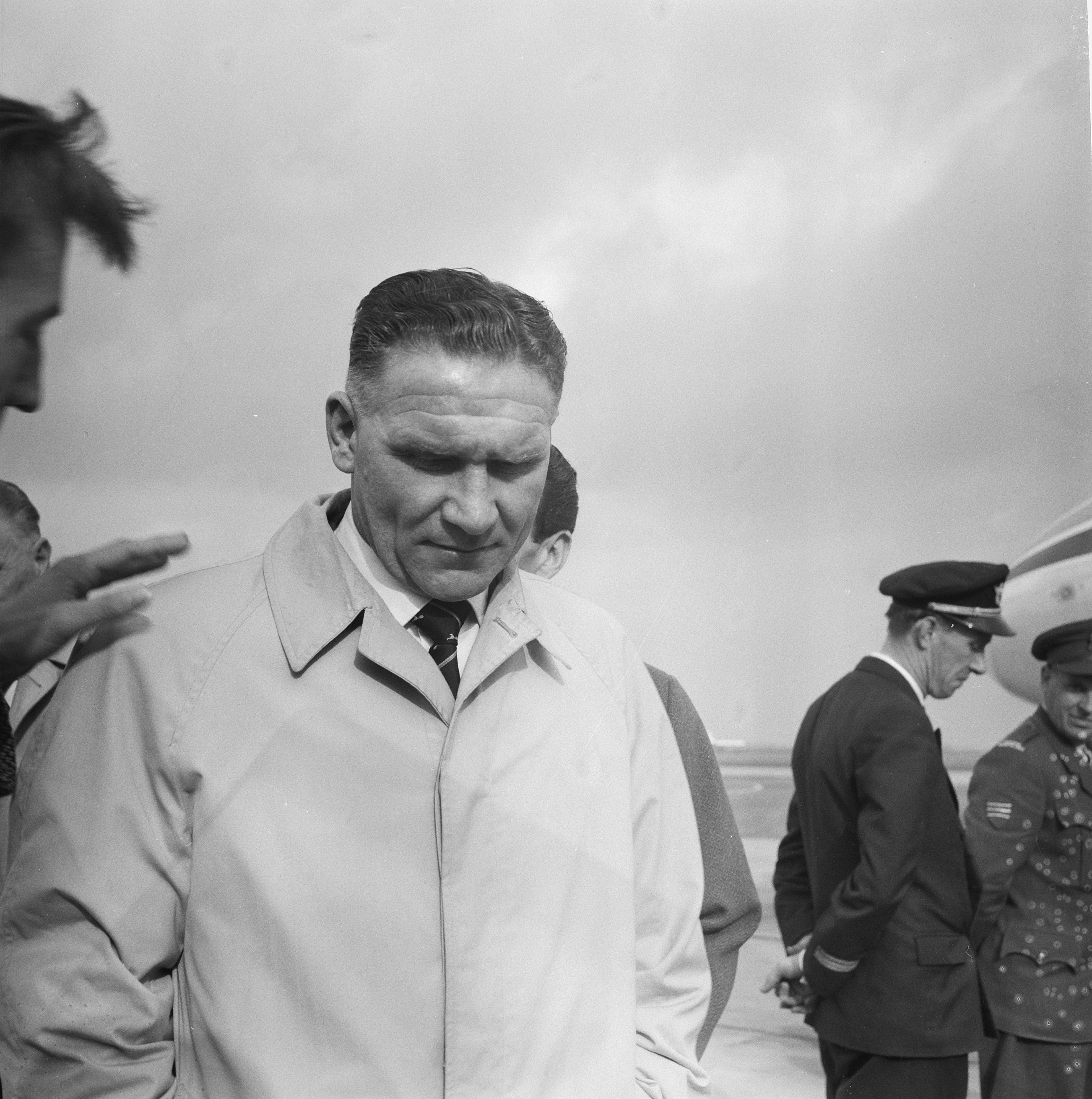 Collectie / Archief : Fotocollectie Anefo Reportage / Serie : [ onbekend ] Beschrijving : Aankomst elftal Tottenham Hotspur op Zestienhoven. Manager Bill Nicholson Datum : 31 oktober 1961 Locatie : Rotterdam, Zuid-Holland Trefwoorden : sport, trainers, voetbal Persoonsnaam : Nicholson Bill Fotograaf : Lindeboom, Henk / Anefo Auteursrechthebbende : Nationaal Archief Materiaalsoort : Negatief (zwart/wit) Nummer archiefinventaris : bekijk toegang 2.24.01.03 Bestanddeelnummer : 913-1244